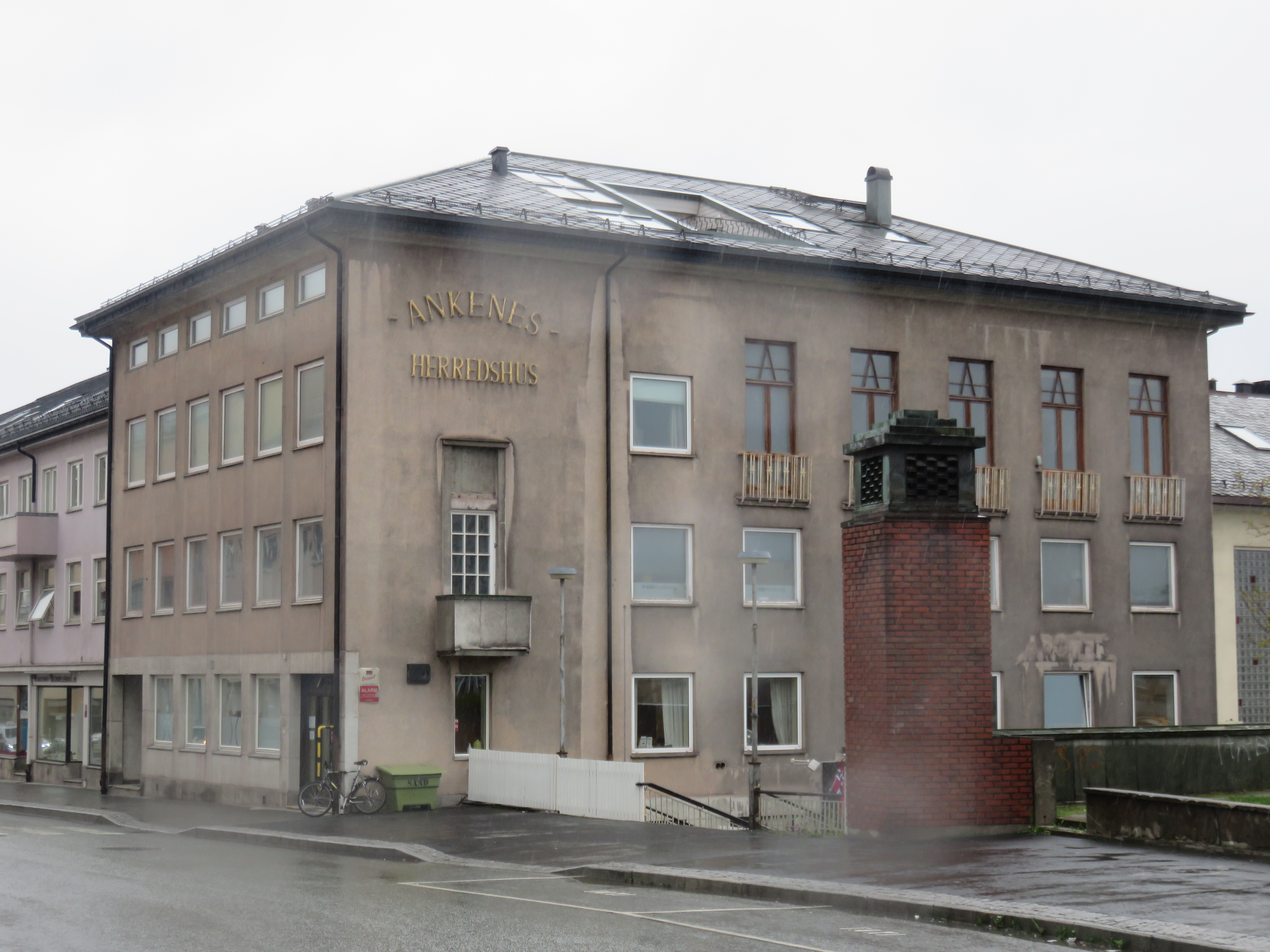 Ankenes kommunes gamle herredshus i Dronningens gate.